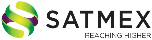 SATMEX